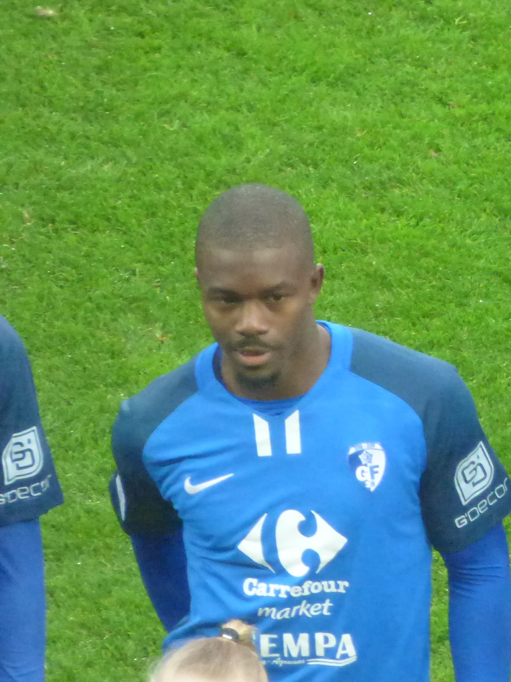 Arsène Elogo avant le match RC Lens / Grenoble Foot 38, le 24 novembre 2018, comptant pour la quinzième journée du championnat de France de football de Ligue 2 2018-2019, au Stade Bollaert-Delelis.